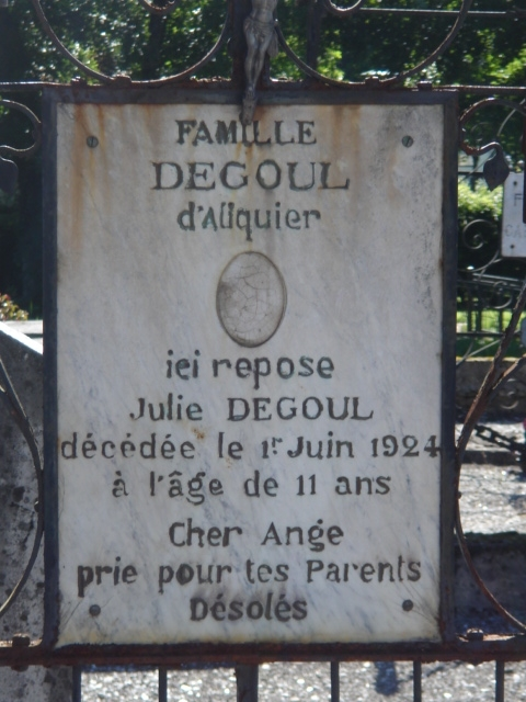 Cimetière ancien de Vic-sur-Cère